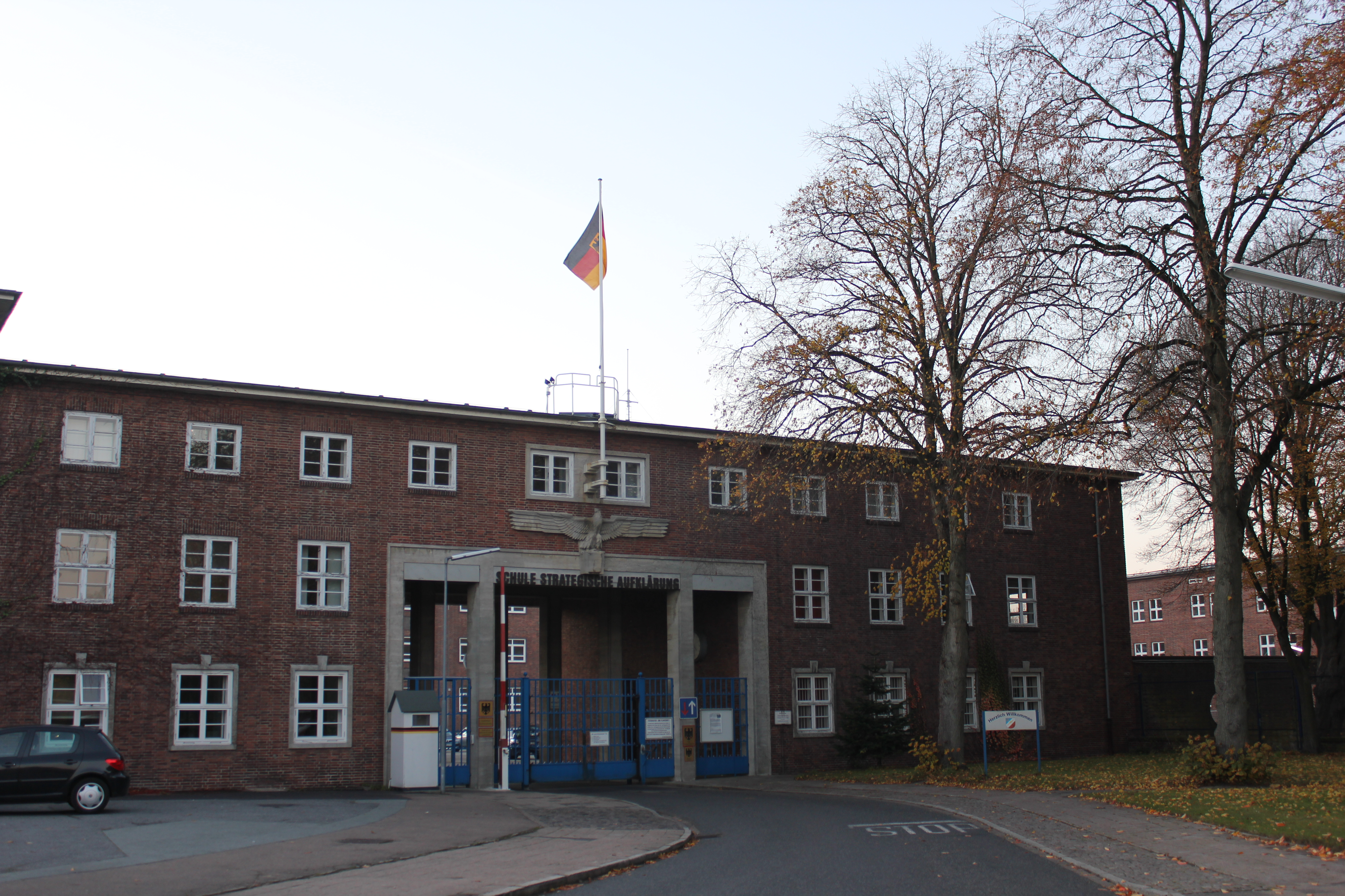 Portal der Schule für Strategische Aufklärung in Flensburg-Mürwik (2011), früher Marine-Nachrichtenschule,dann Marinefernmeldeschule